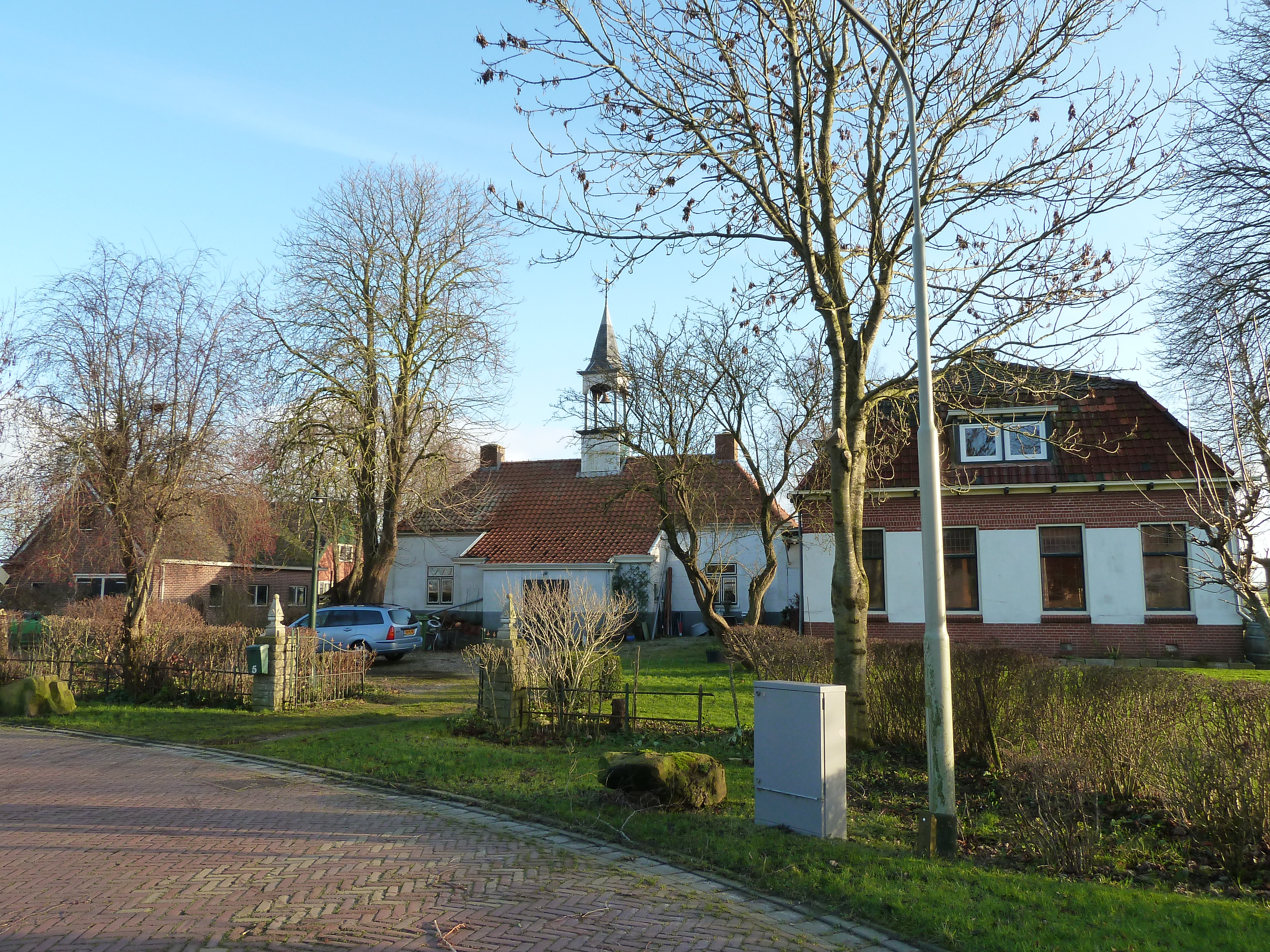 Voormalige school (met torentje) en meesterswoning van Sint-Annen.